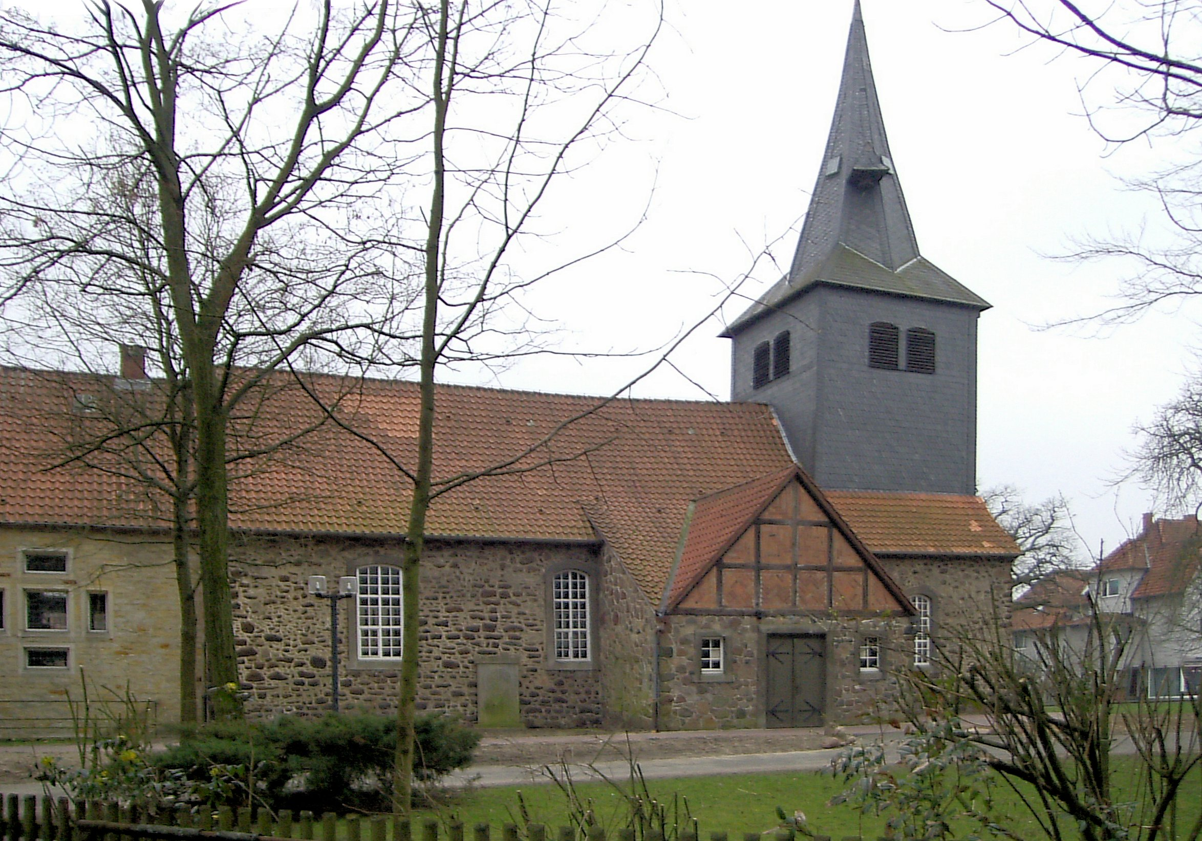 evangelische Kirche St. Petri in Hänigsen